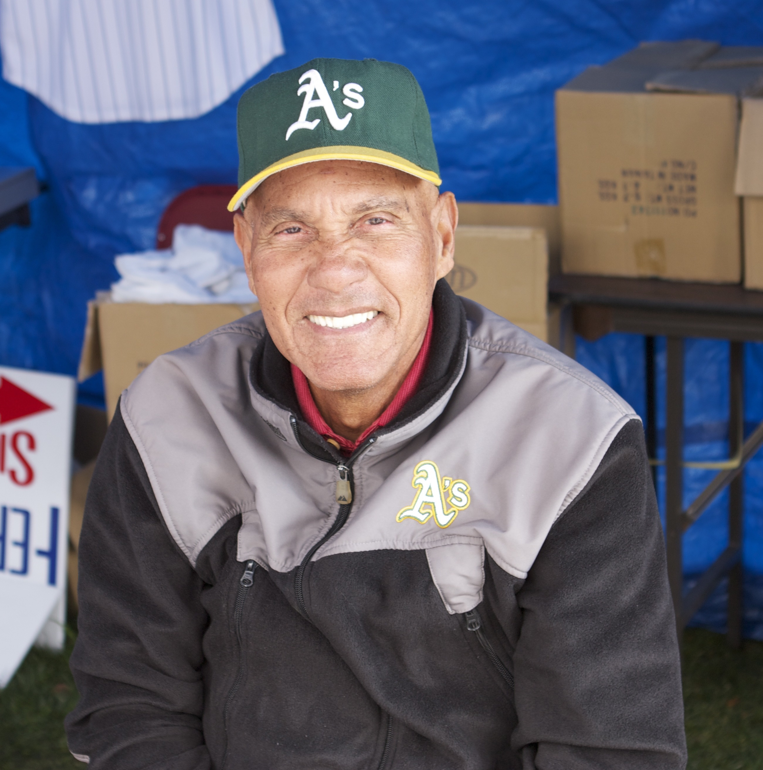 Bert Campaneris